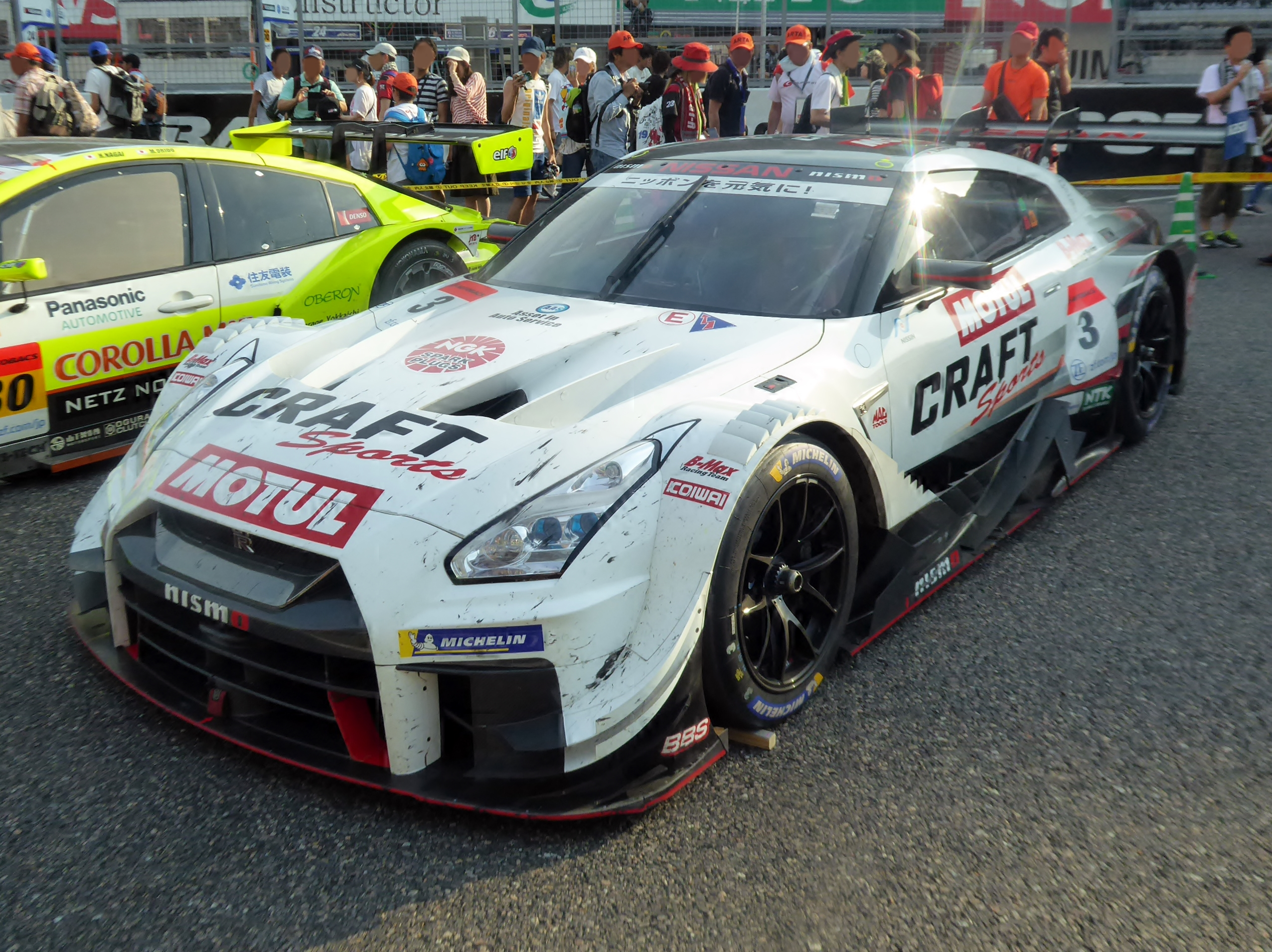 2019年鈴鹿GT300㎞終了後の3号車CRAFTSPORTS MOTUL GT-Rを撮影。